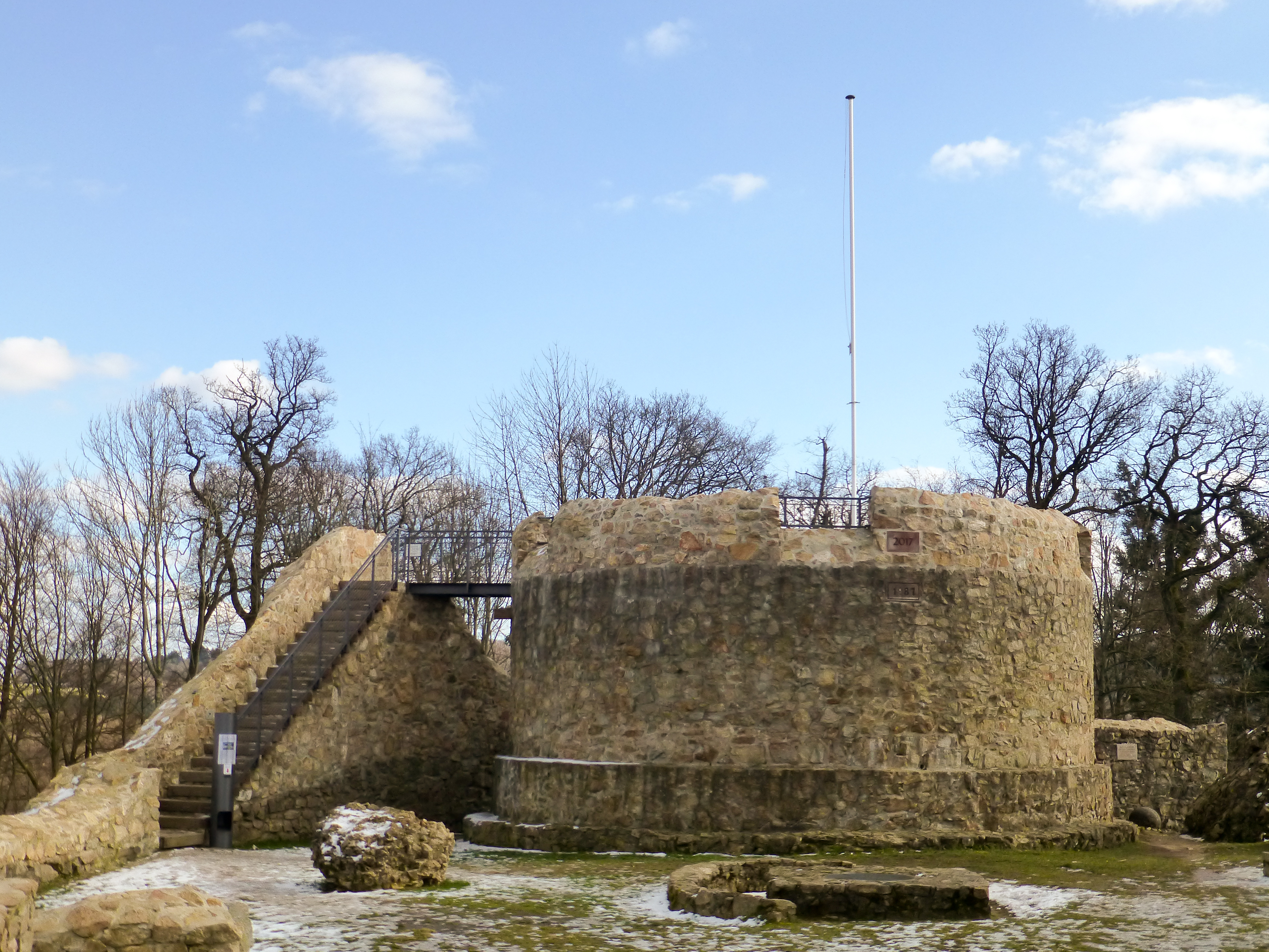 Bergfried der Burg Tannenberg mit neuem Treppenaufgang und begehbarer Plattform (Februar 2018); Ansicht von der Westseite